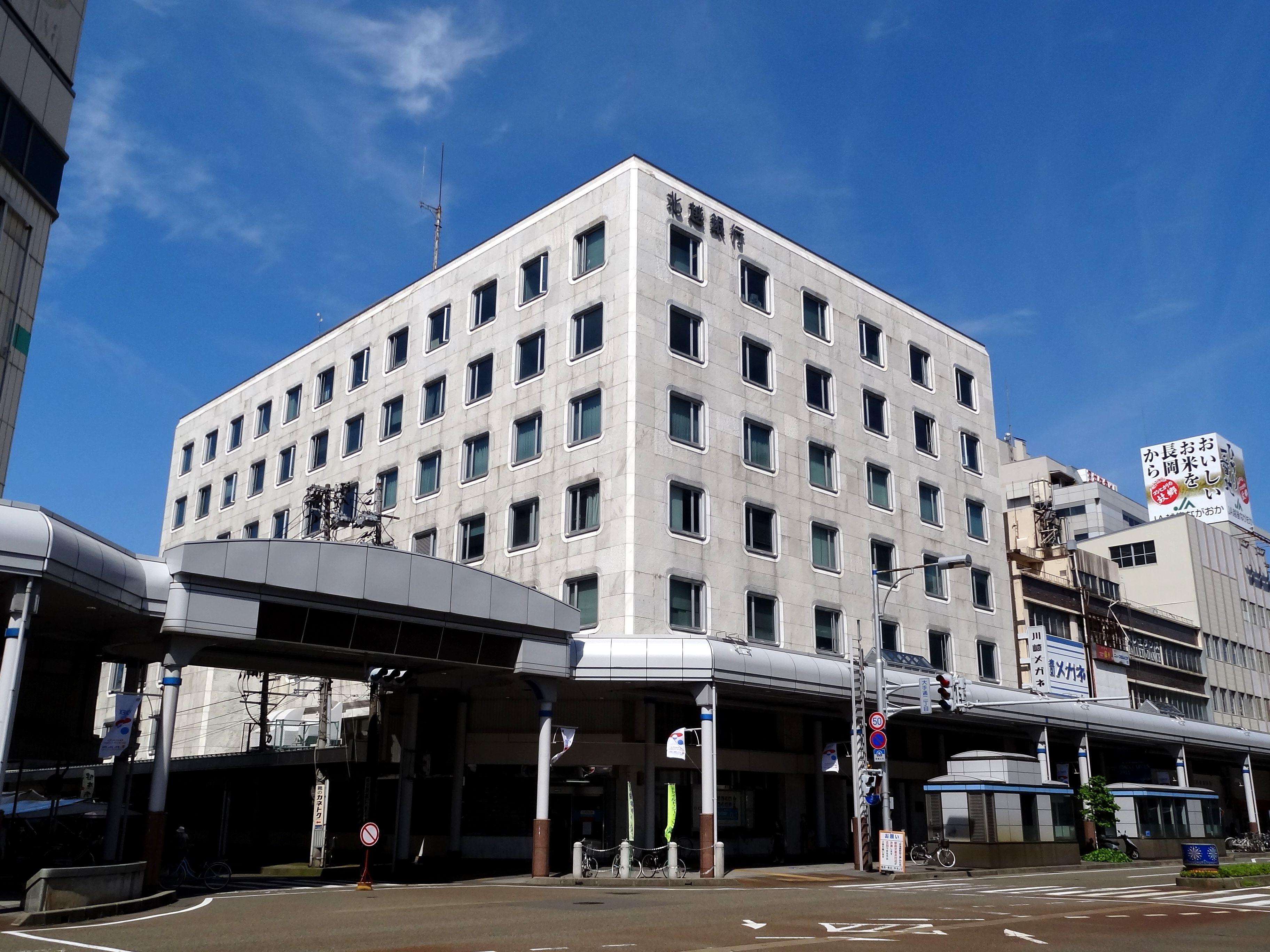 北越銀行本店（新潟県長岡市）